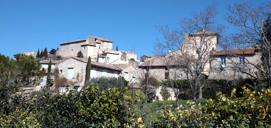 village of Lagnes Vaucluse, France